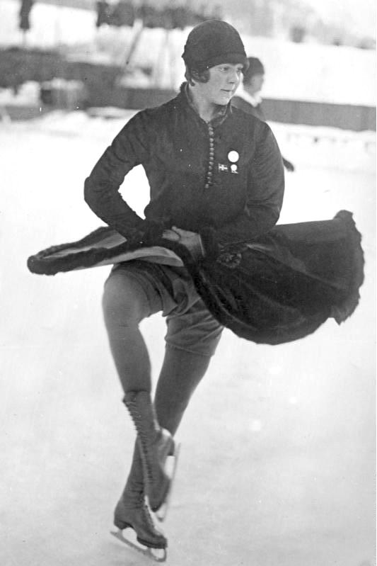 Die grosse Winter-Olympiade in St. Moritz! Neueste Aufnahmen von unserm nach St. Moritz entsandten Sonder-Bild-Berichterstatter! Kampf der Damen im Eiskunstlaufen um den olympischen Sieg. Die mit den grössten Aussichten startende Weltmeisterin Sonja Henie beim Vorführen einer schwierigen Pirouette. Information added by Wikimedia users.